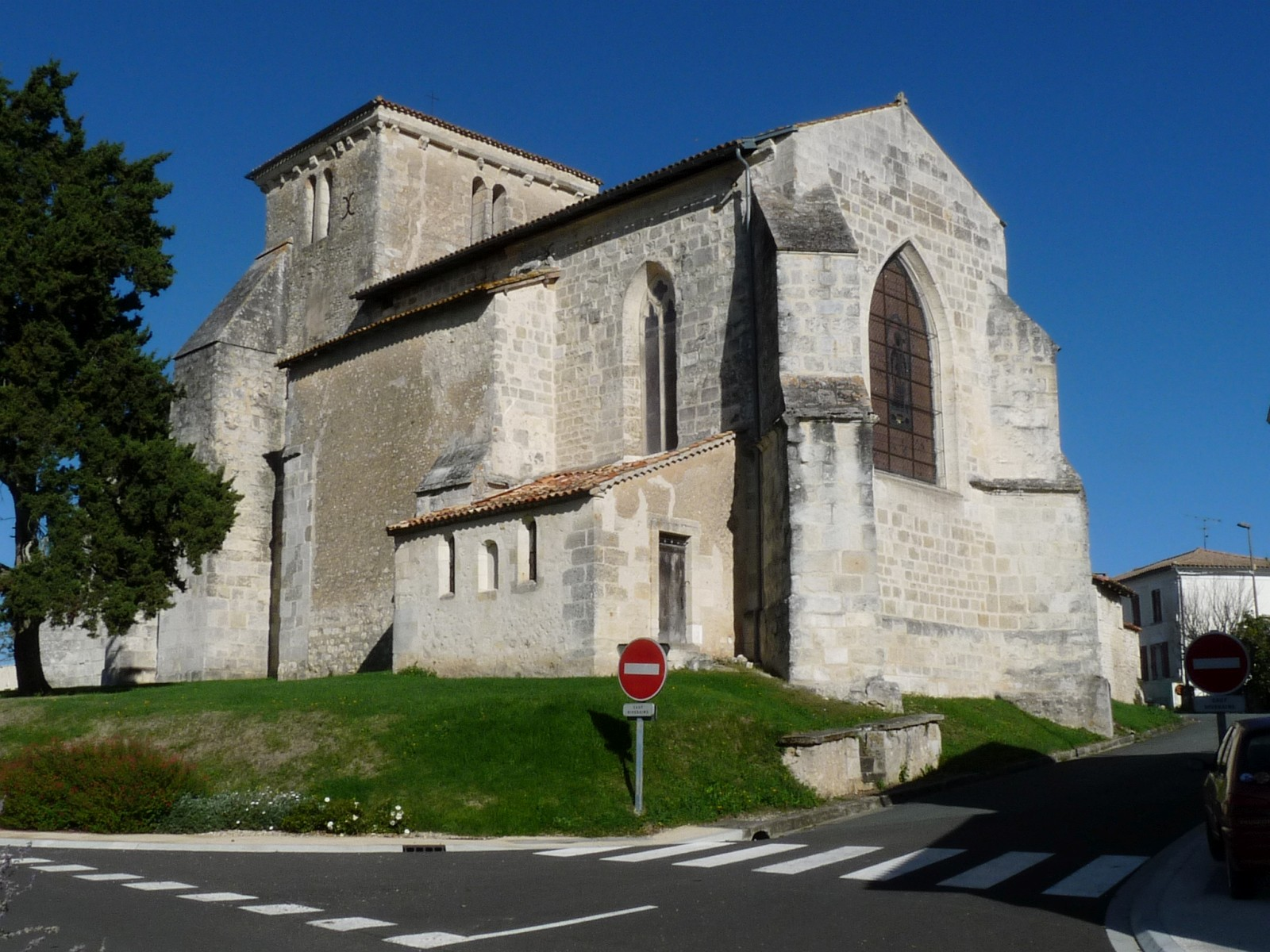 Eglise de Saint-Palais-de-Négrignac, Charente-Maritime, France